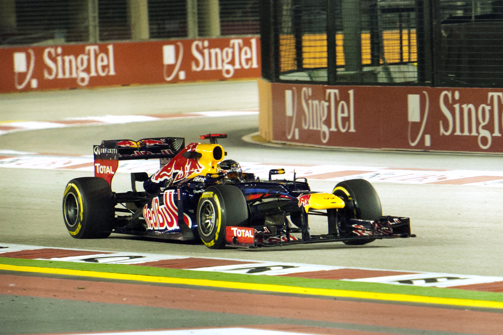 Vettel